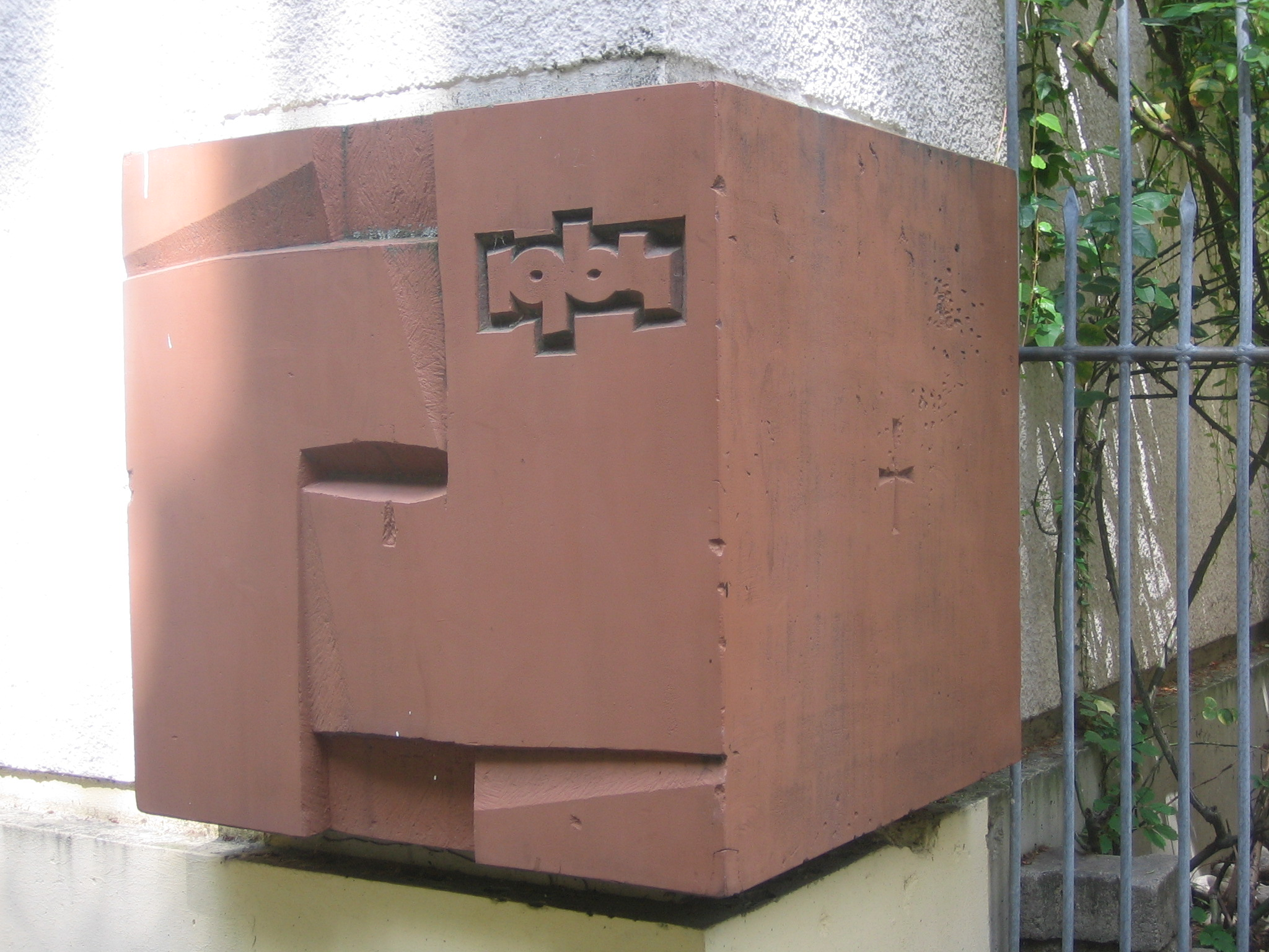 Weithin sichtbarer Eckstein an der Südostecke des Kirchengebäudes Liebfrauen in Mainz. Mit der Eckstein-Legung 1964 sollte das Heilswirken Gottes gepriesen werden: Ich danke dir, daß du mich erhört hast; du bist für mich zum Retter geworden. Der Stein, den die Bauleute verwarfen, er ist zum Eckstein geworden. [1] ↑ Ps. 118,21-25